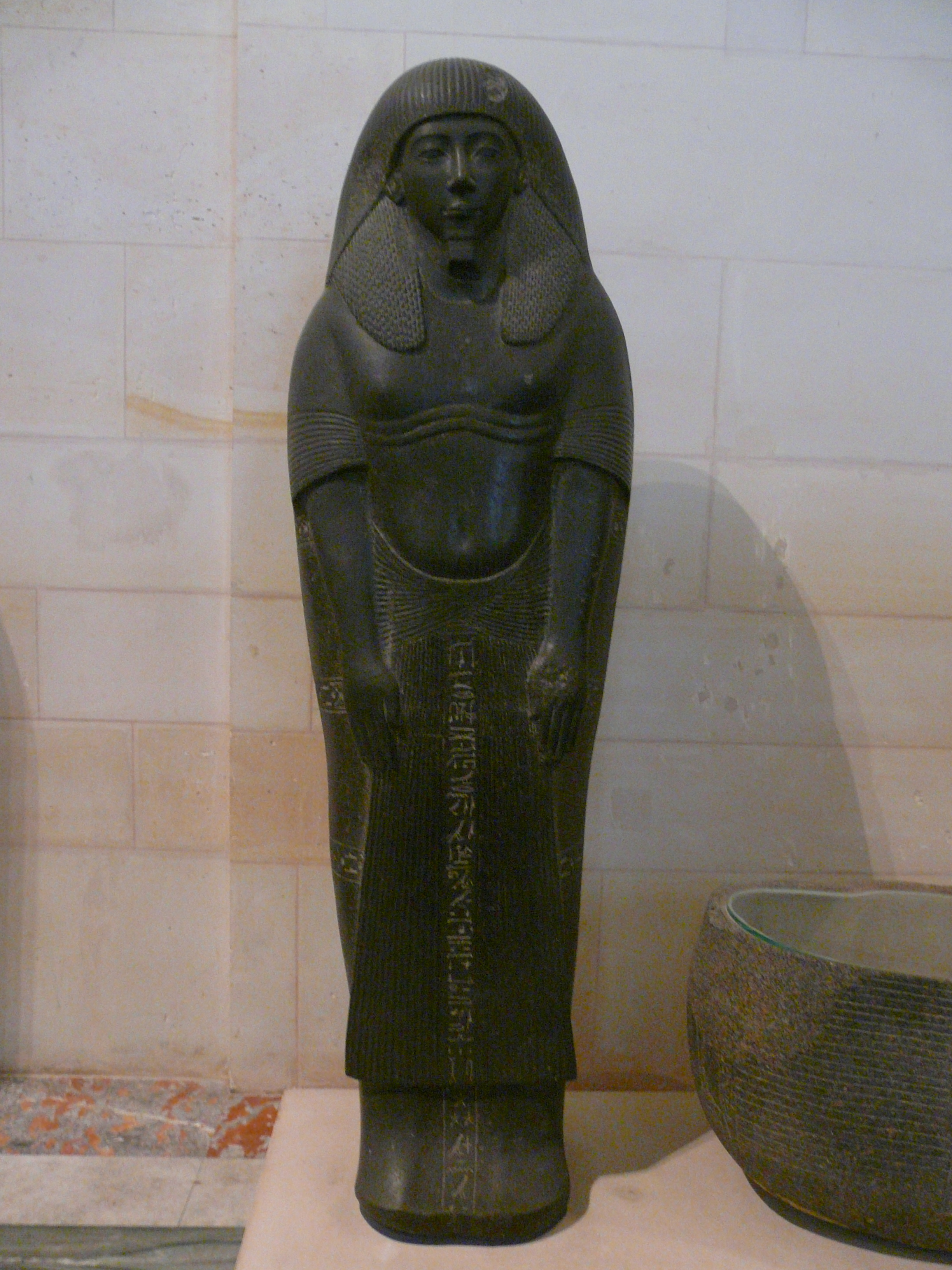 Couvercle du sarcophage d'Iniouia, grand intendant de Memphis (fin 18e - 19e dynastie) en diorite - Saqqara - Musée du Louvre